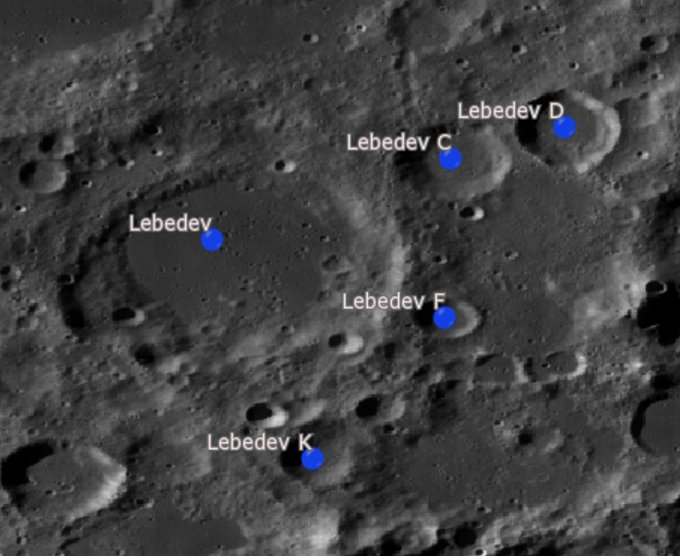 Cráter lunar Lebedev. Cráteres satélite. (Imagen LRO)